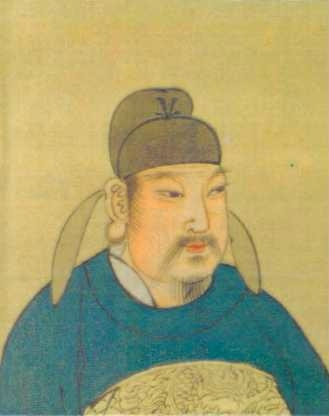 tangxuanzong